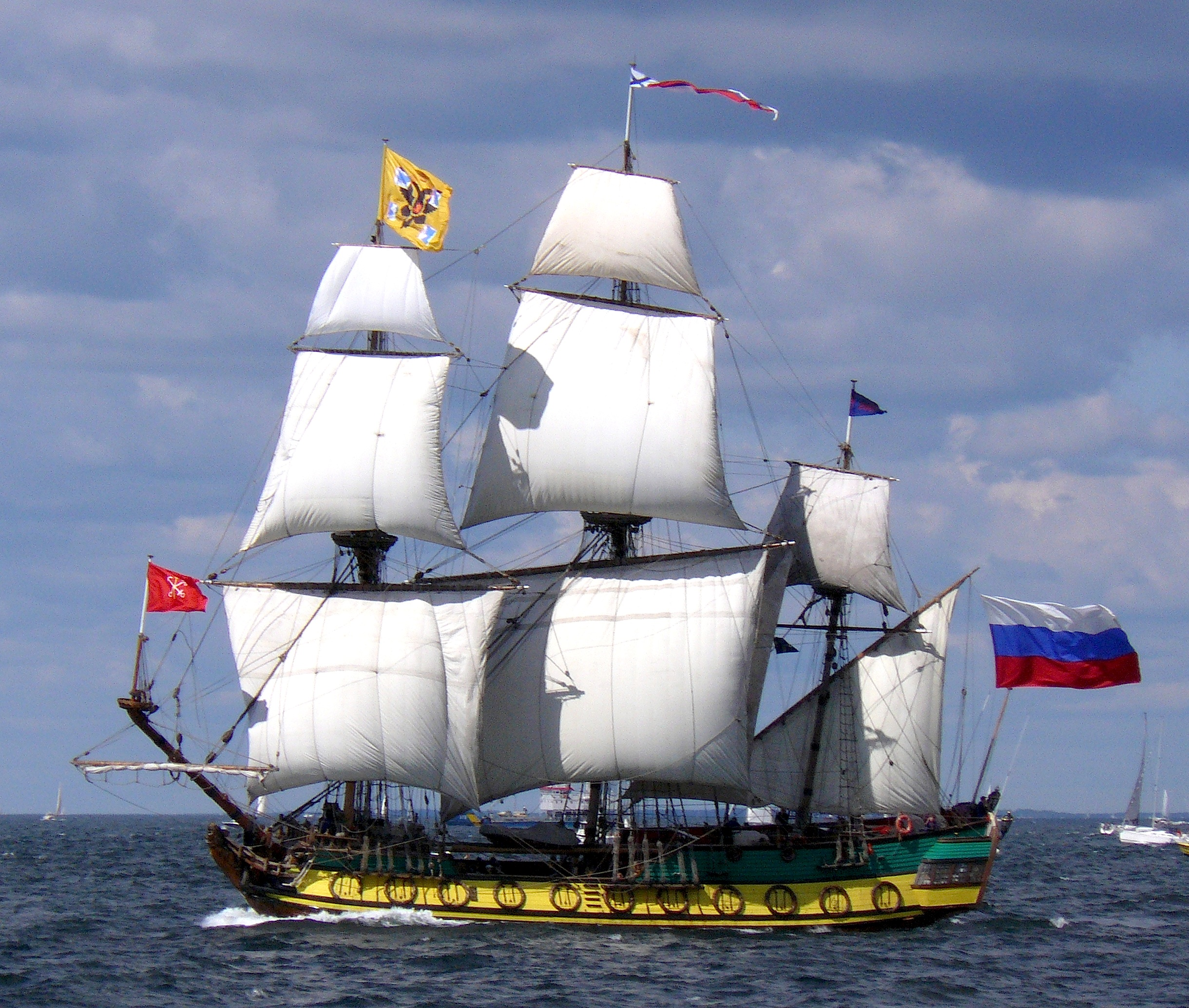 Shtandart